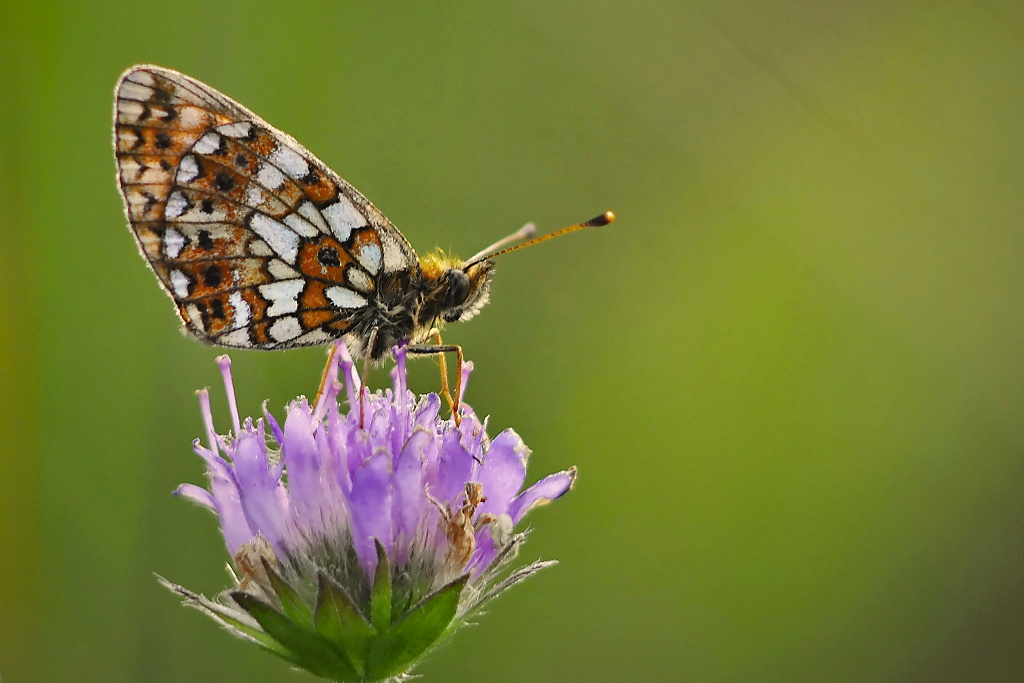 Perleťovec dvanáctitečný (Boloria selene), Plzeňsko, 2014